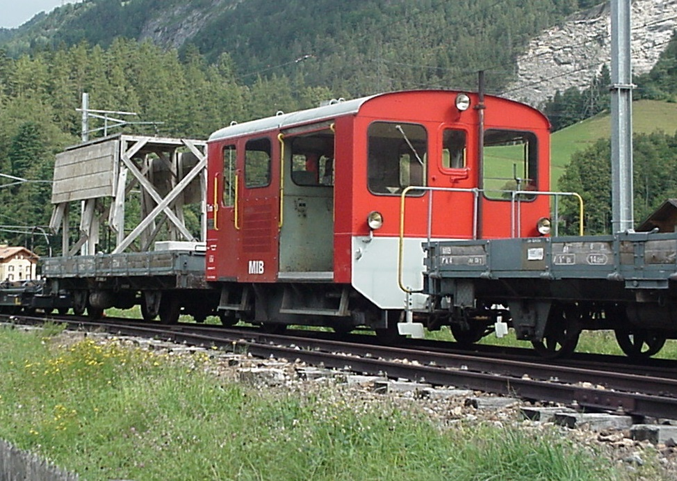 Tm II 10 (1959), ehemals Brünigbahn Tm II 980; gekauft 2000; 2011 an La Traction verkauft